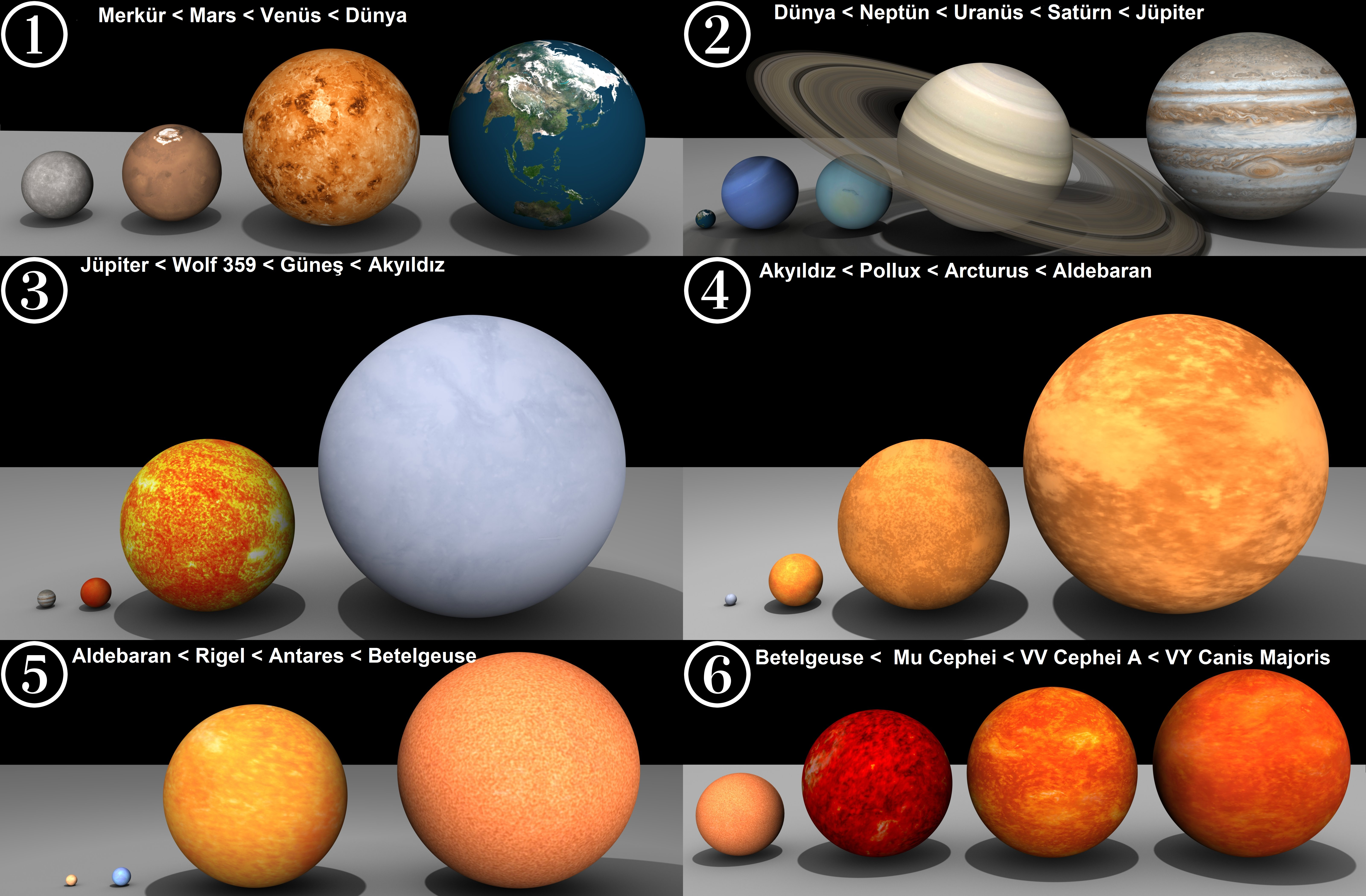 Bazı gezegen ve yıldızların karşılaştırması.